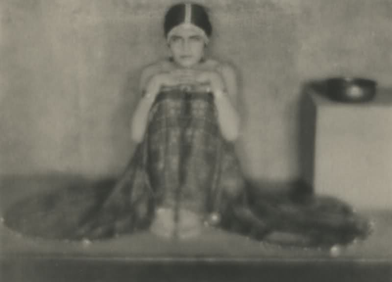 Autor fotografií: Jane Reece ; Jane Reece´s photographs V roce 1919 v Los Angeles portrétovala Edwarda Westona, Tinu Modotti... Ve svém obrazovém stylu je zachytila v kostýmech, kterým tak dala "umělecké" vyjádření. Snímek s Modottiovou byl nazván Má sláva utopená v mělkém poháru (Have Drowned My Glory in a Shallow Cup, 1919). Tento snímek se později stal jedním z jejích nejznámějších děl.